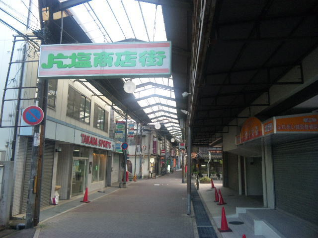 大和高田市の片塩商店街。